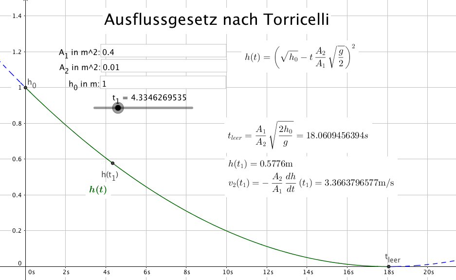 Toricelli